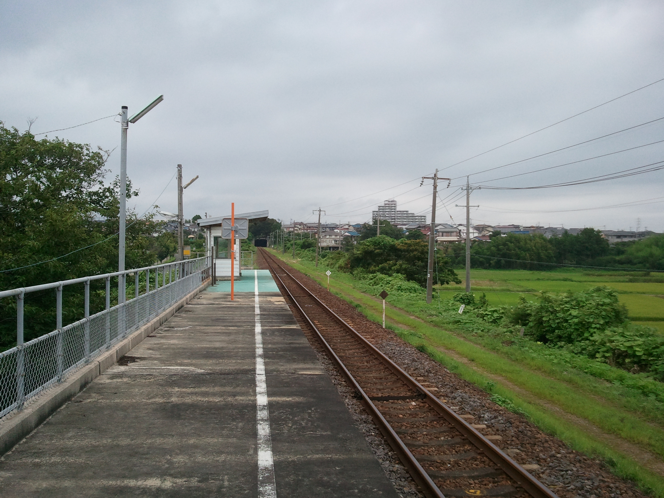 伊勢上野駅プラットホーム